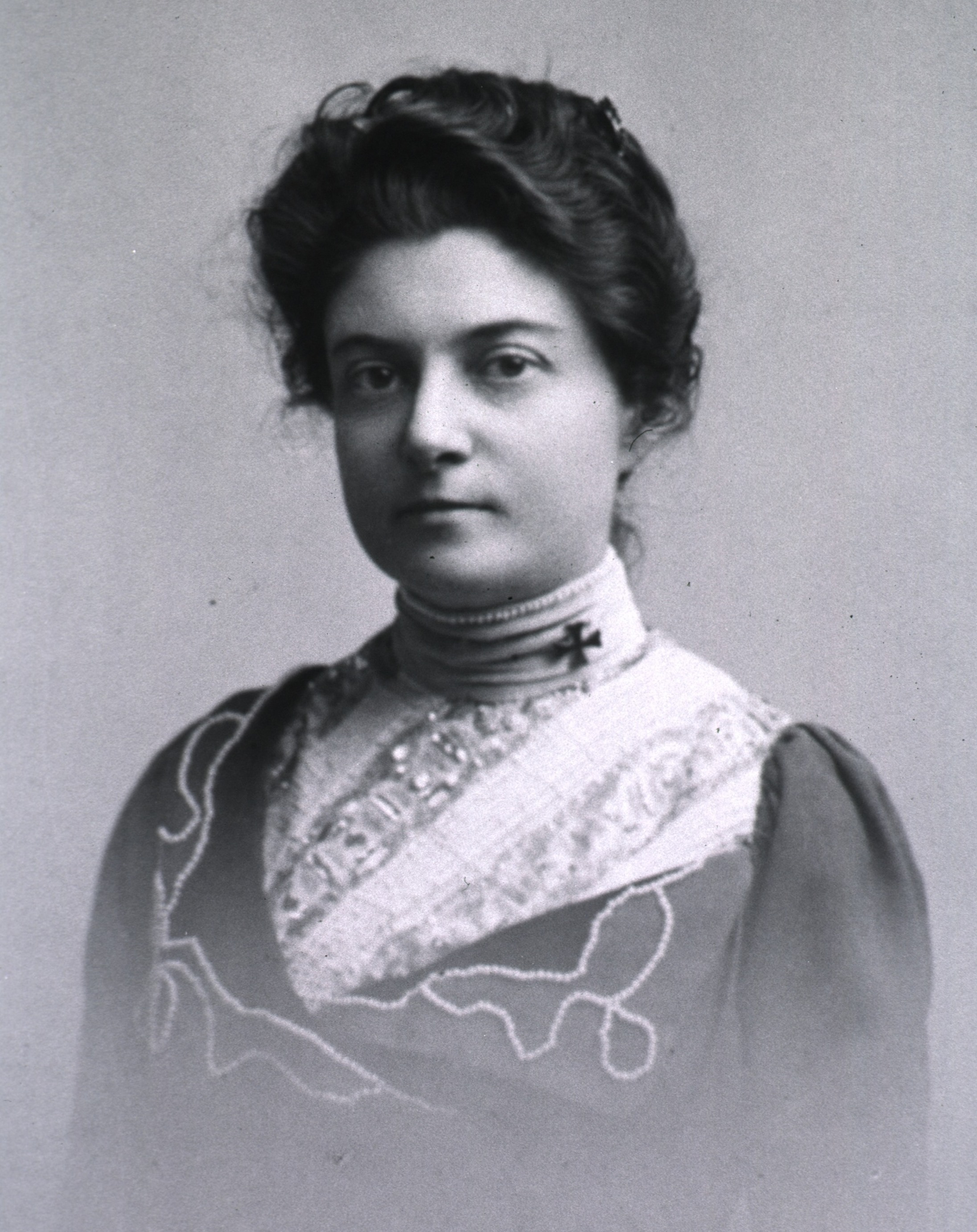 Anita N. McGee